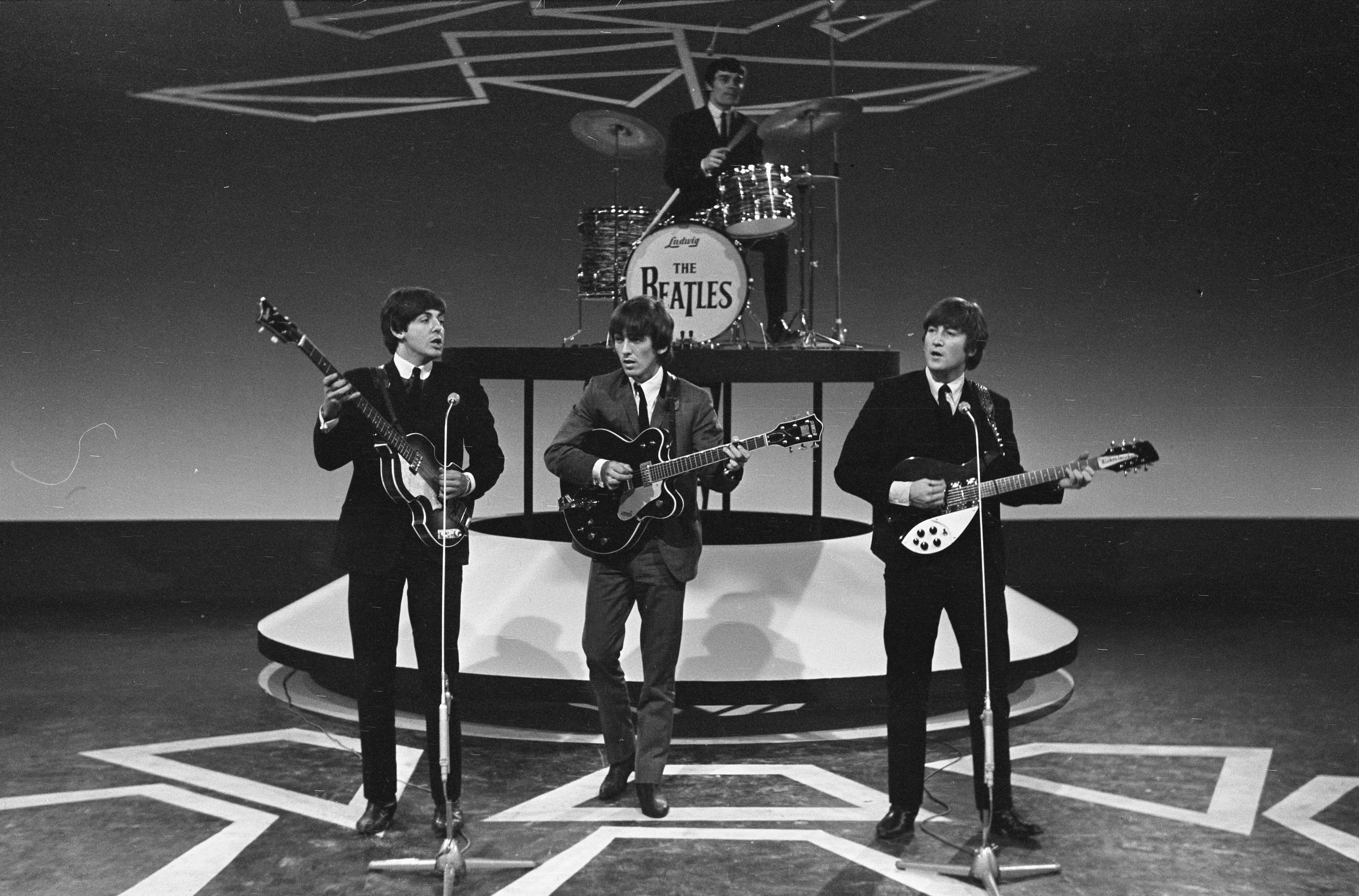 Collectie / Archief : Fotocollectie Anefo Reportage / Serie : [ onbekend ] Beschrijving : Televisie-optreden van The Beatles in Treslong te Hillegom [vlnr. Paul McCartney, George Harrison, John Lennon, achter het drumstel Jimmie Nicol (vervanger van Ringo Starr] Datum : 5 juni 1964 Locatie : Hillegom Trefwoorden : groepsportretten, popgroepen, televisie Instellingsnaam : Beatles, The Fotograaf : Koch, Eric / Anefo Auteursrechthebbende : Nationaal Archief Materiaalsoort : Negatief (zwart/wit) Nummer archiefinventaris : bekijk toegang 2.24.01.05 Bestanddeelnummer : 916-5099